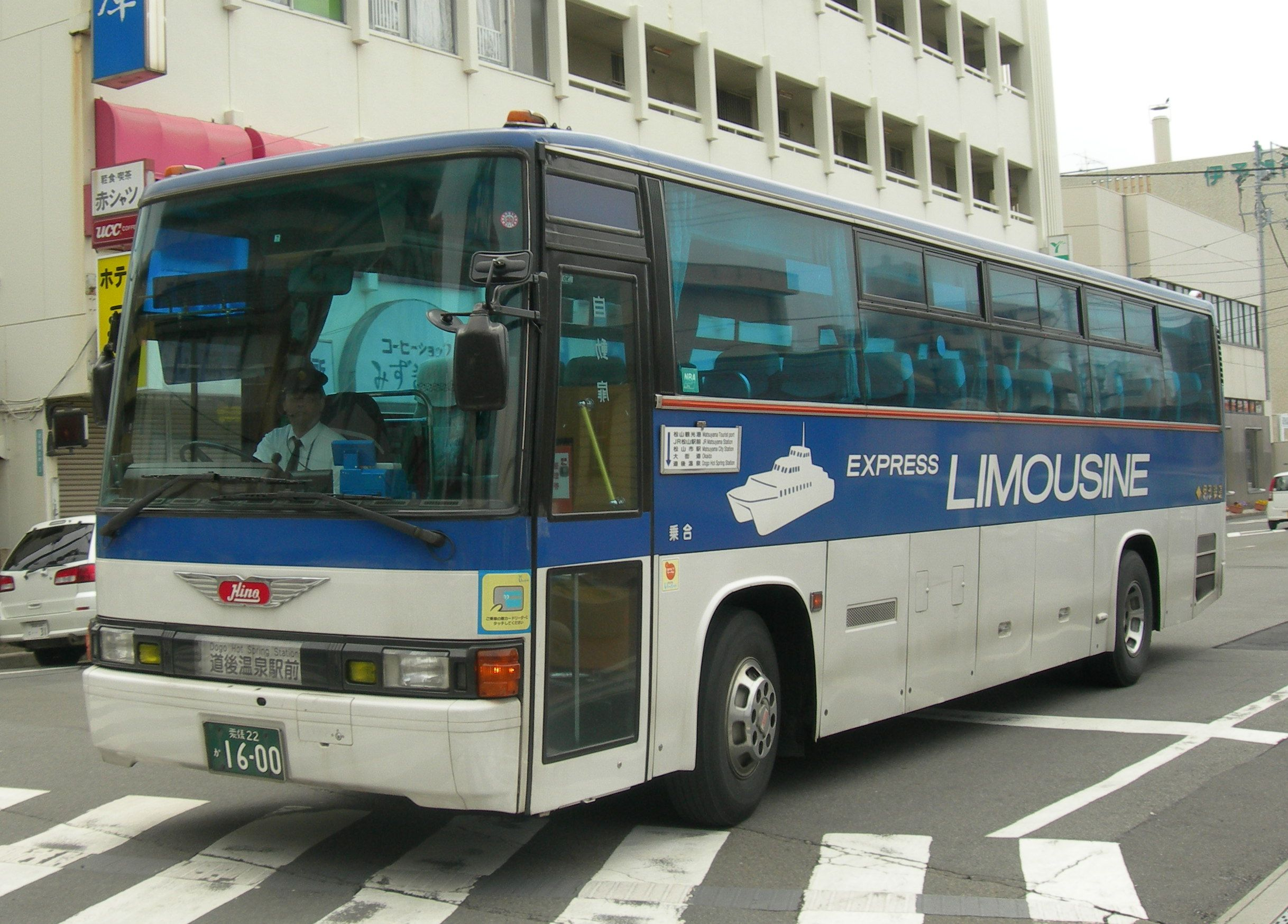 伊予鉄道 リムジンバス用の車両